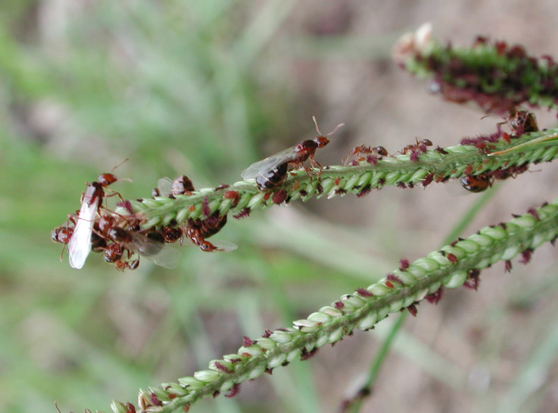 Image copyleft: Image taken by me, released under GFDL, :en:user:Pollinator 01:07, 25 January 2006 (UTC)